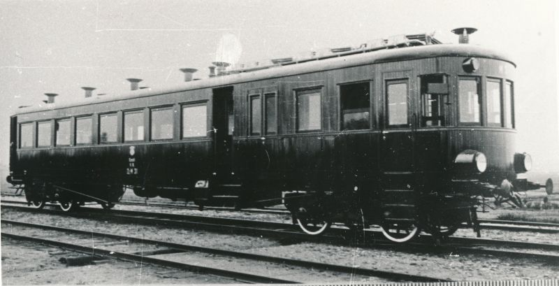 Mootorvagun M31 "Lendav Läänlane".